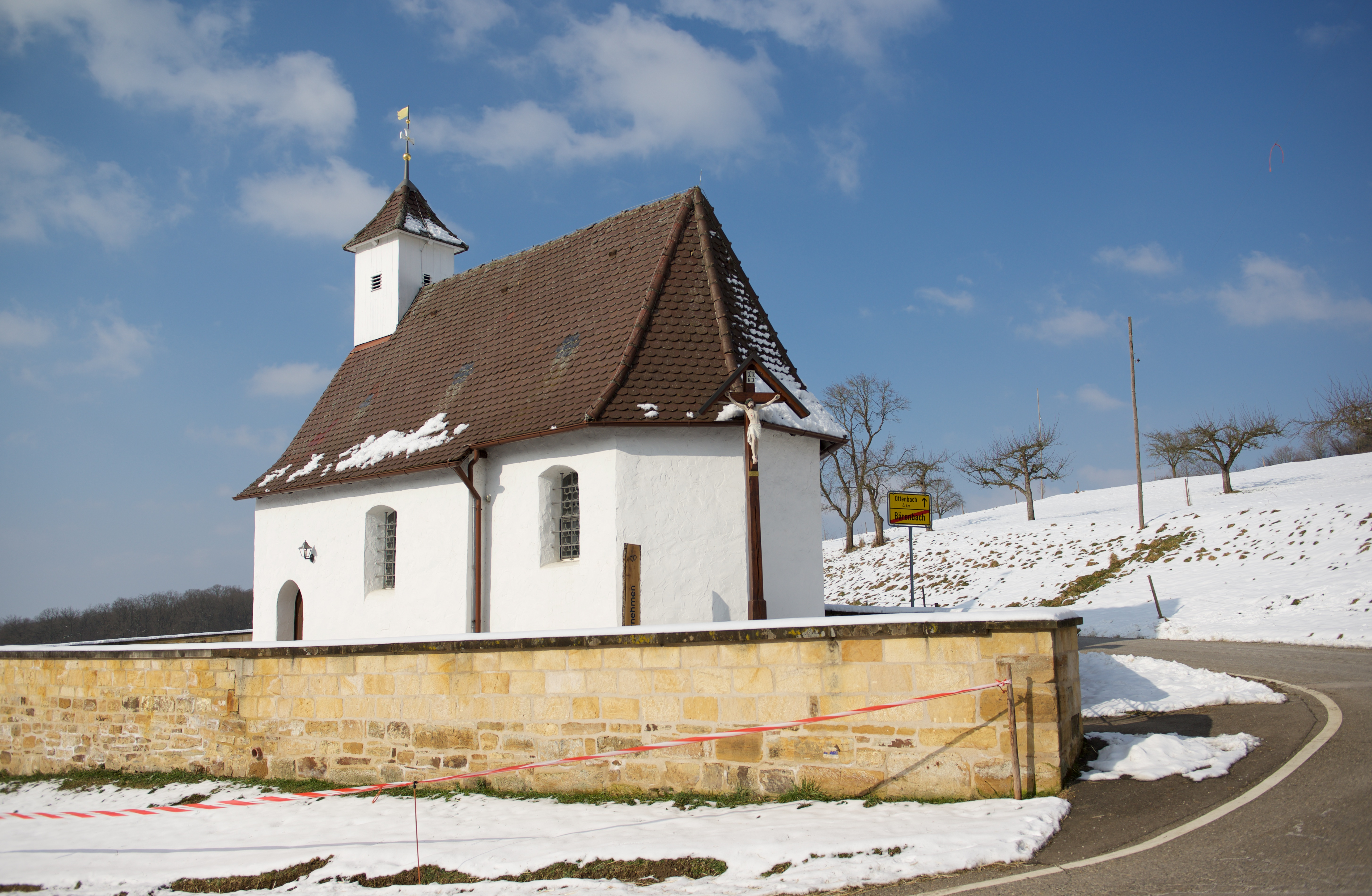 Kapelle Bärenbach